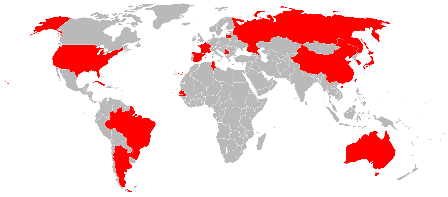 Mapa de los Países Participantes